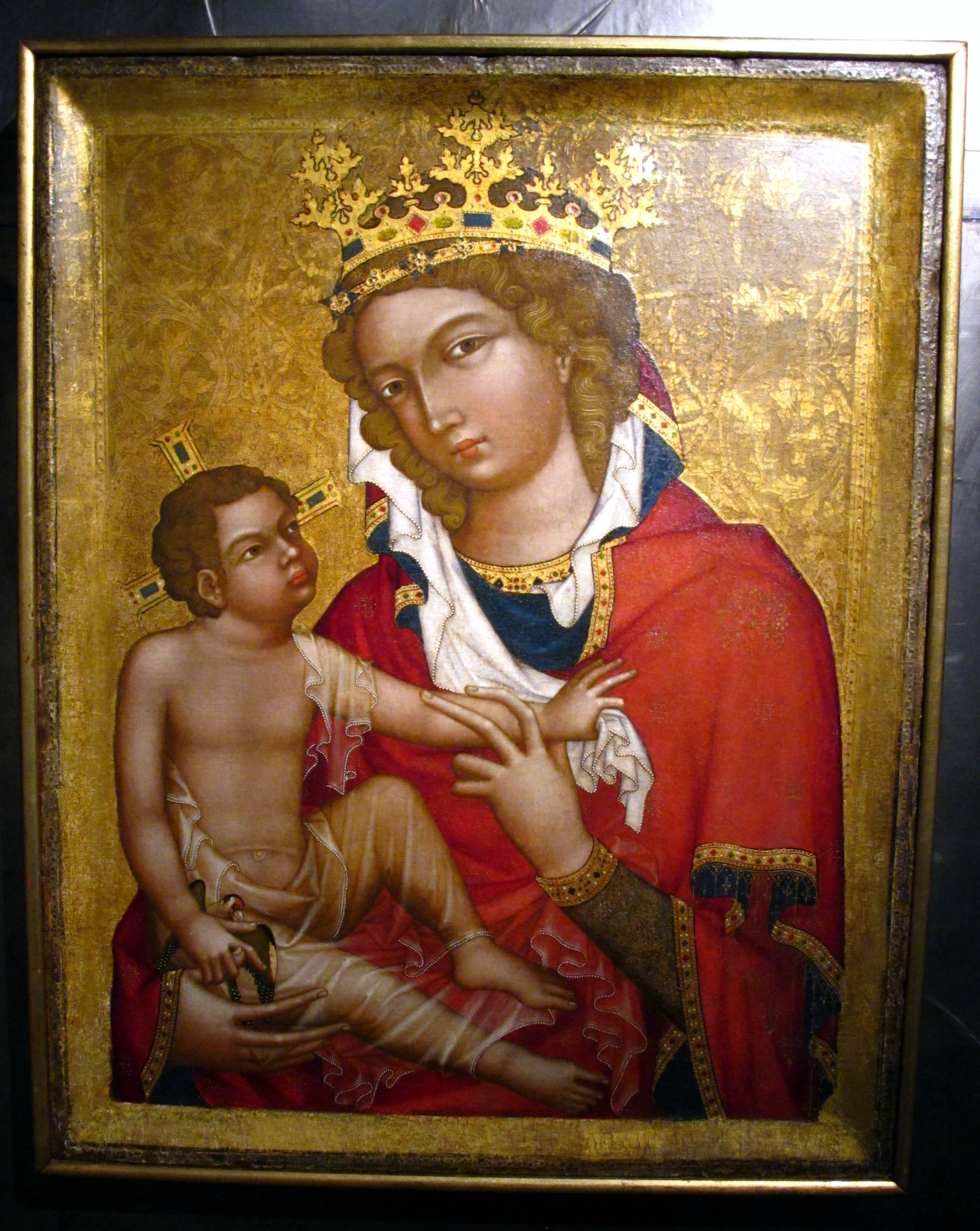 Madona z Veveří (okolo 1350), Anežský klášter Národní galerie v Praze